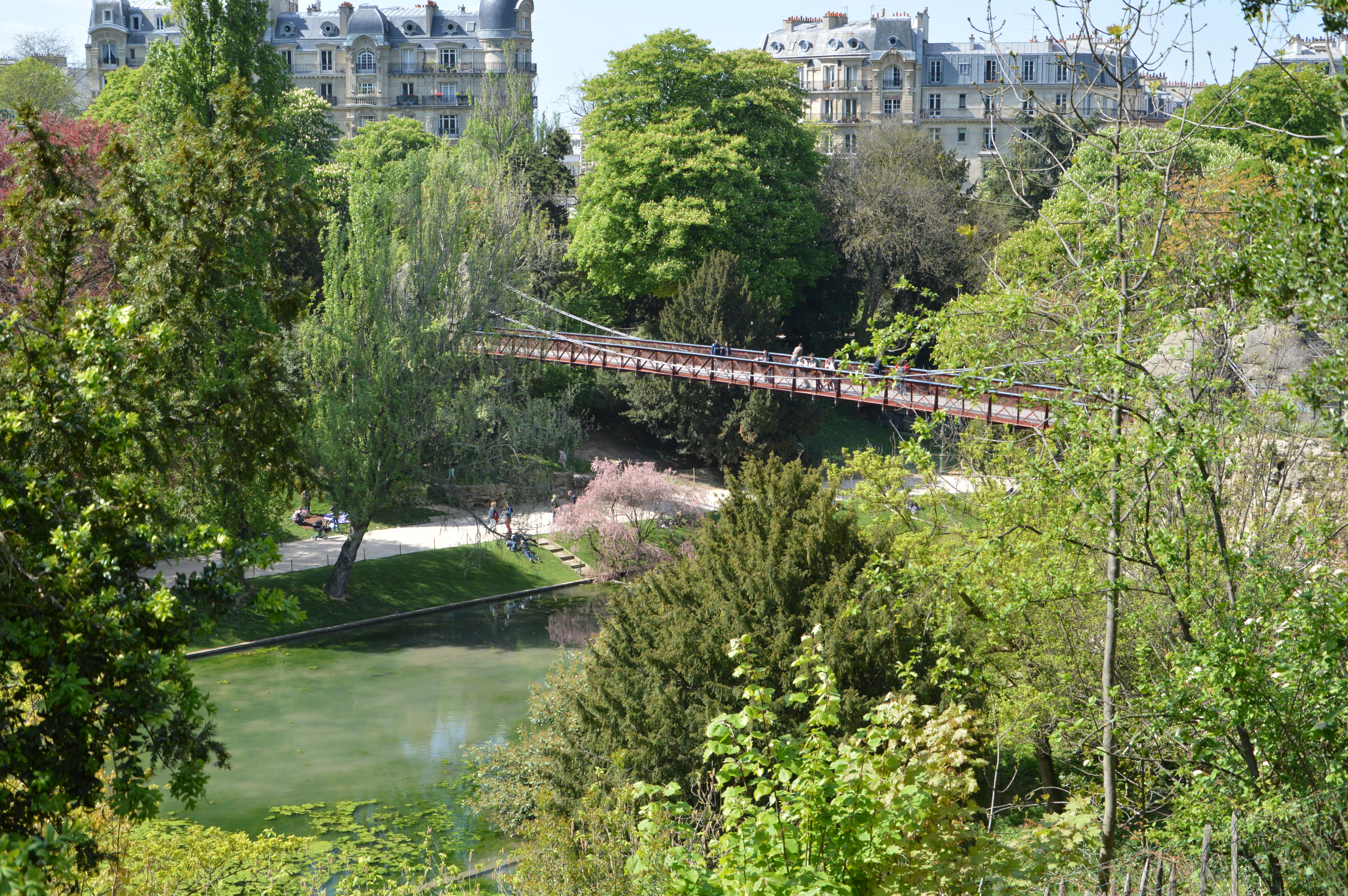 Passerelle suspendue, Buttes Chaumont, Paris.